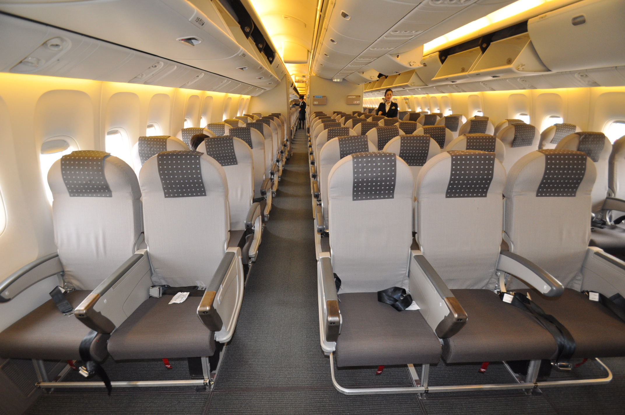 日本航空国内線普通席（ボーイング７６７－３００）